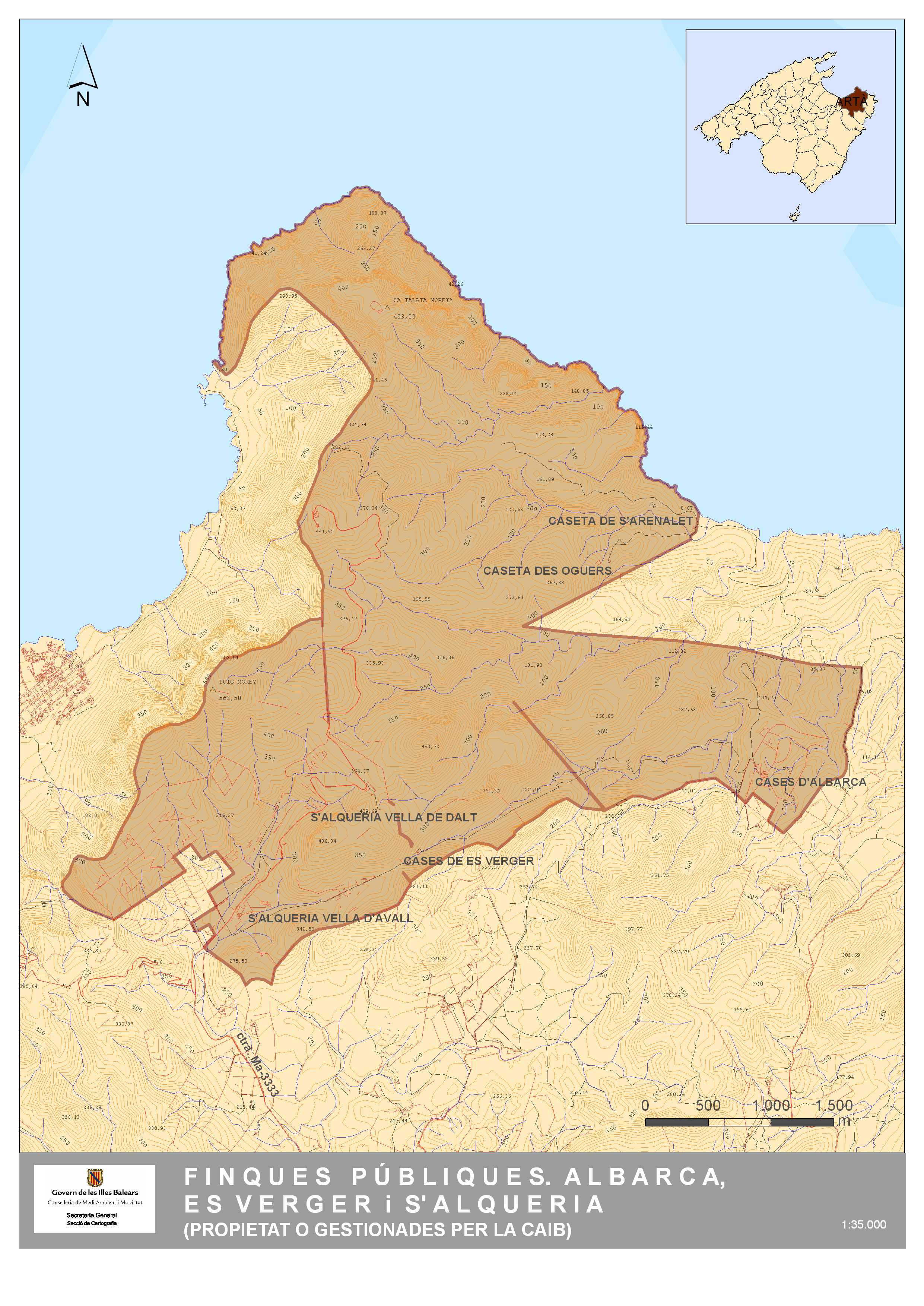 Les finques d'Albarca i es Verger foren adquirides pel govern de les Illes Balears l'any 1999. L'any 2000 el Govern de les Illes Balears adquirí les terres de s'Alqueria Vella. Aquesta finca ens dóna la benvinguda al Parc natural de la península de Llevant